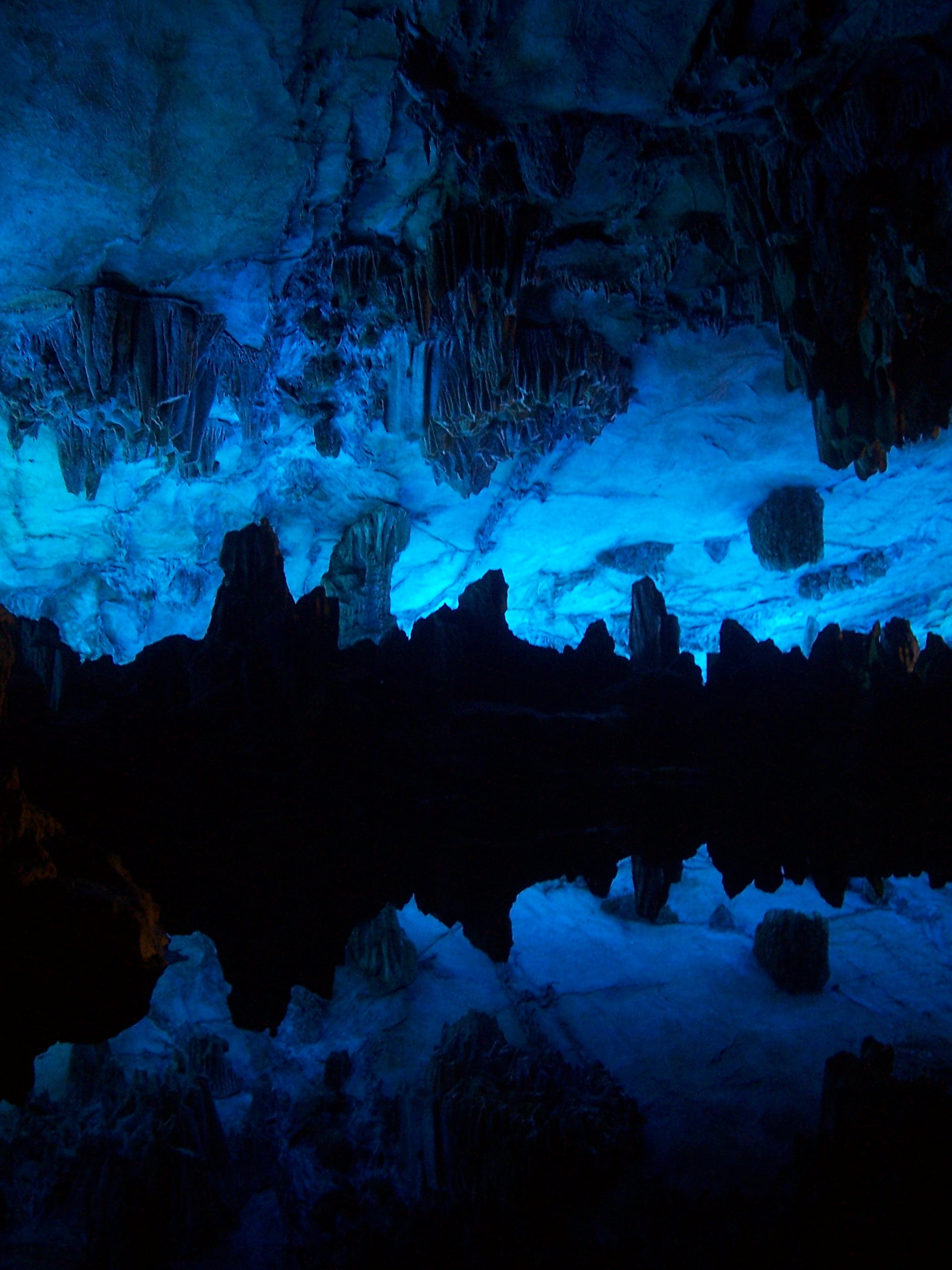 Giulin (Chine).